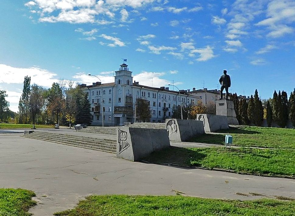 Площадь Фрунзе во Владимире. В центре памятник М.И. Фрунзе.